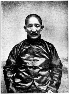 江贊桑布，中華民國國會議員